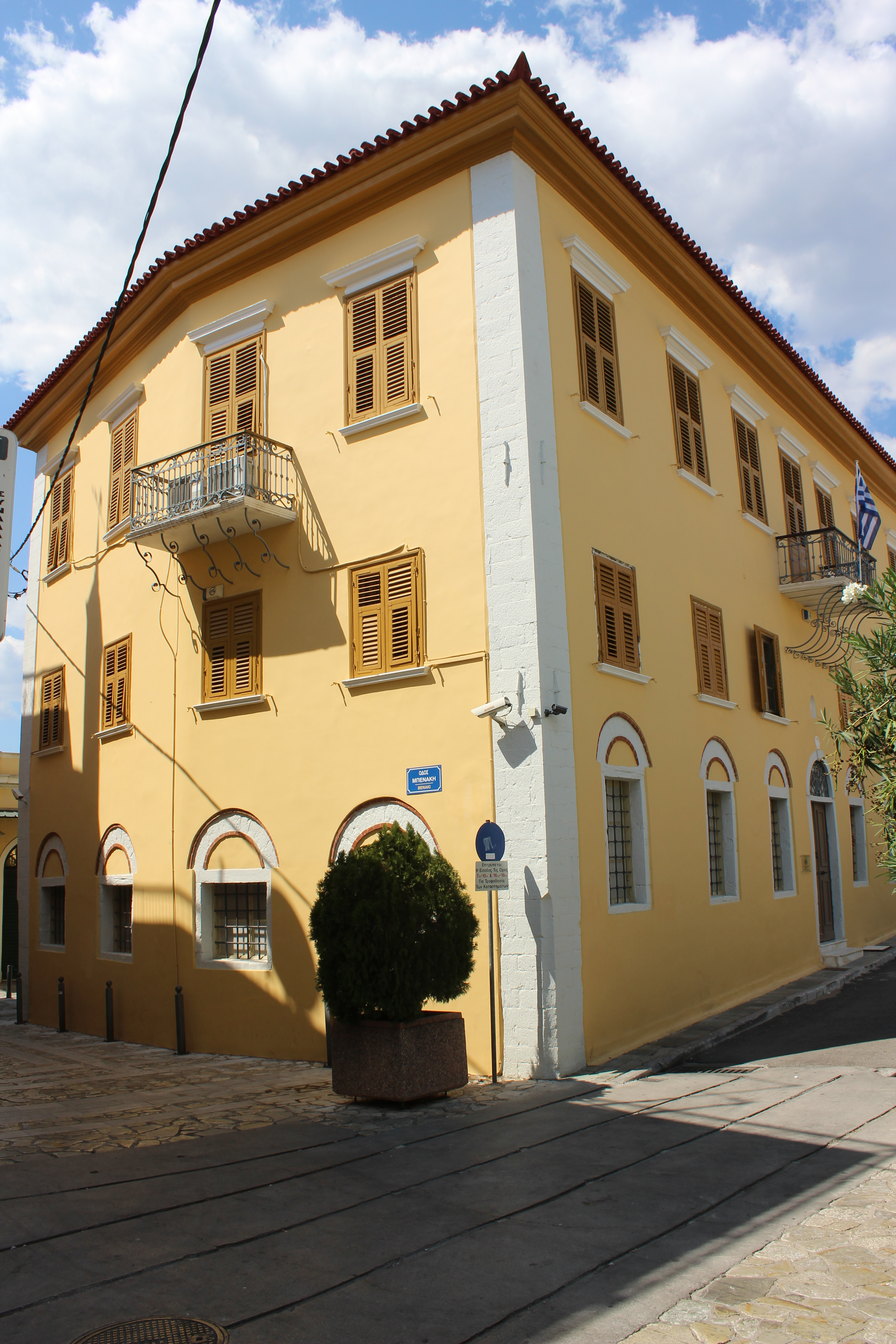 Μπενάκειο Αρχαιολογικό Μουσείο Καλαμάτας«Μπενάκειο Αρχαιολογικό Μουσείο Καλαμάτας»